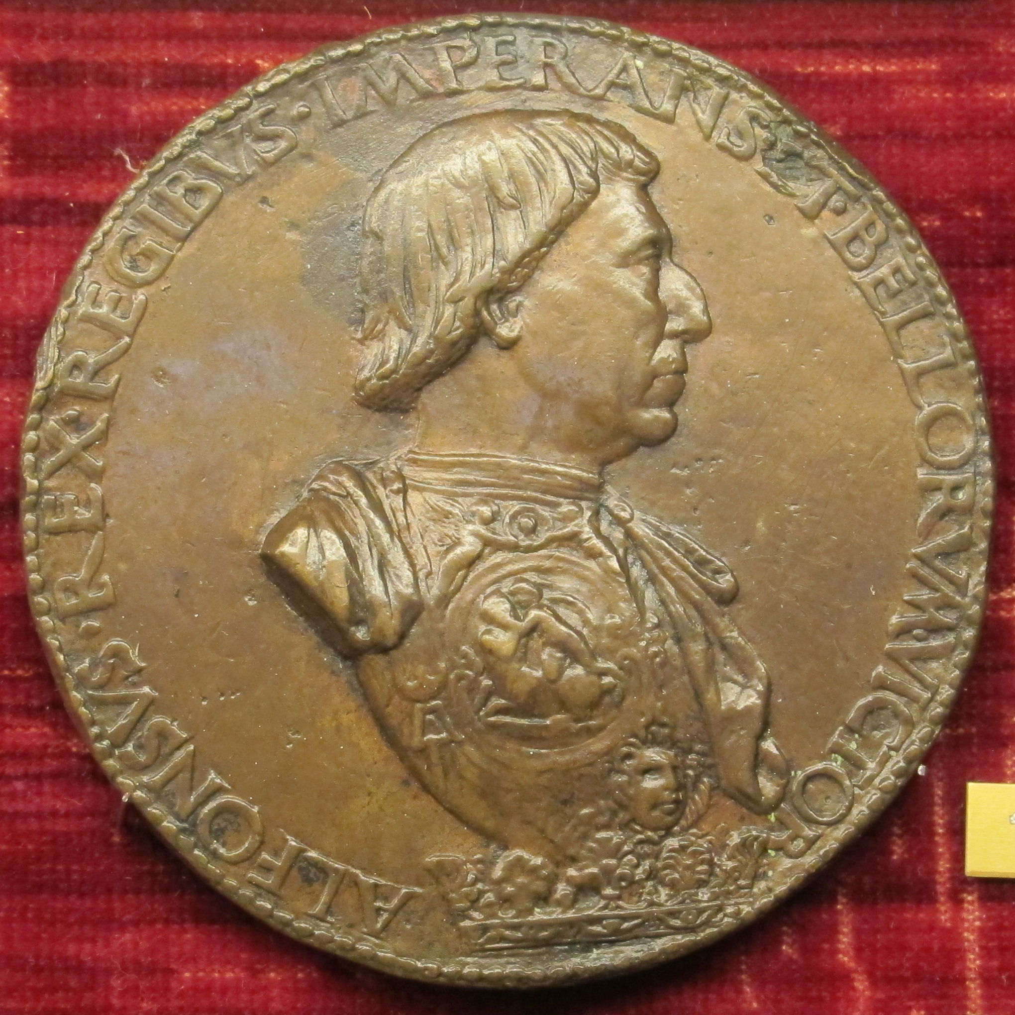 Medaglia di Alfonso I, re di Napoli